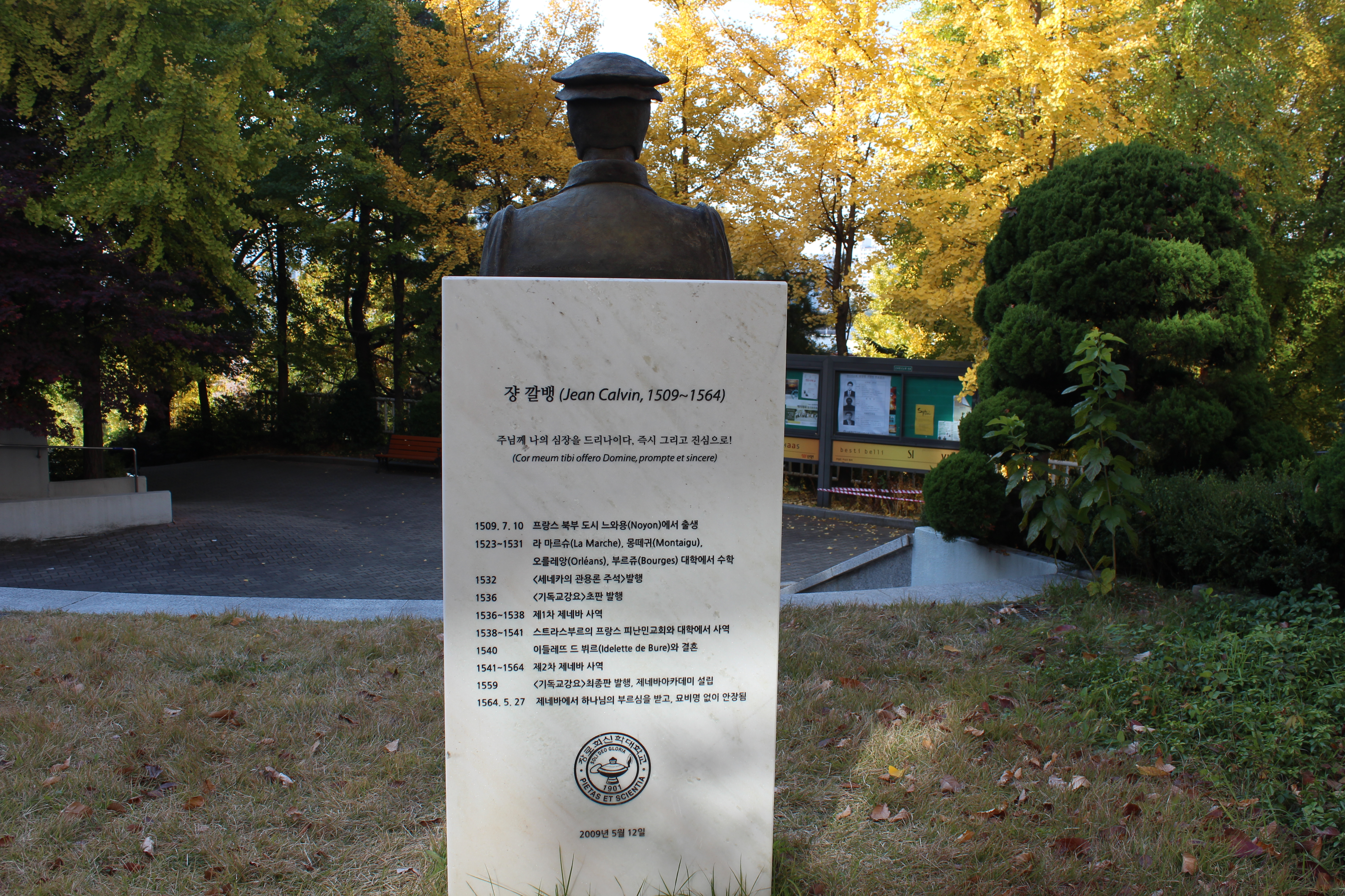 프랑스의 유명한 조각가 다니엘 르클레르크(Daniel Lecleroq)가 만든 장 칼뱅 동상 뒷면, 장소 장신대학교 1. 건립장소: 장로회신학대학교 마포삼열기념동상 옆 2. 조각가:프랑스 Daniel Leclercq 교수 3. 작품크기: 60cmx60cmx30cm 좌대크기: 170cm(세로)x80cm(가로)x50cm(폭) 4. 재료: 청동 5. 제작기간: 2008년 10월부터 2009년 4월까지 6. 후원: 요한칼빈탄생500주년기념사업회